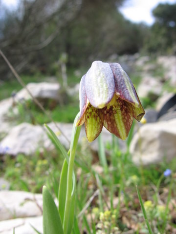 גביעונית עבת עלים, Fritillaria crassifolia